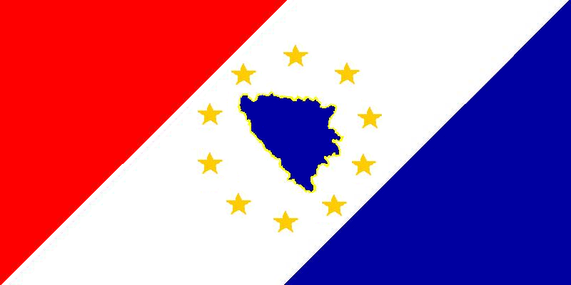 BiH zastava 2